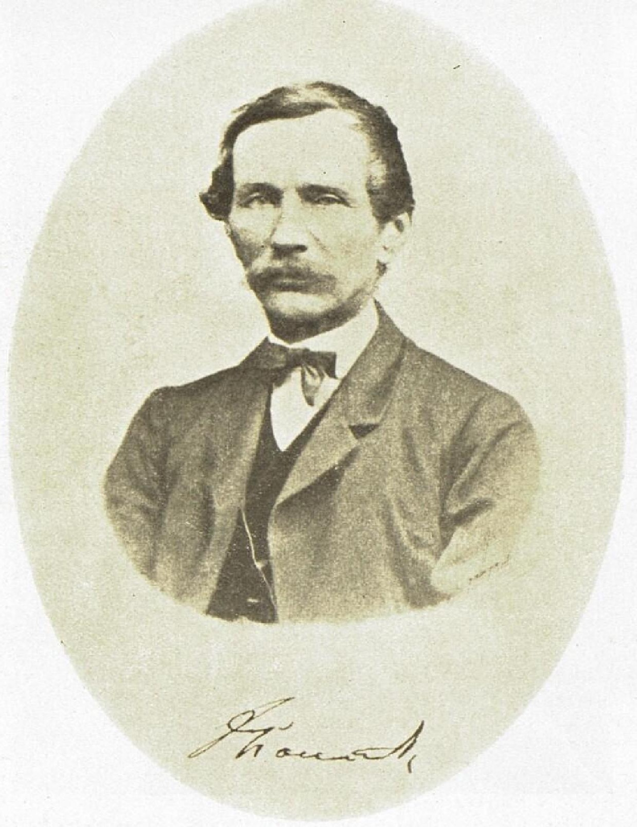 František Bouček (1810-1882), český lékař, zakladatel první poděbradské nemocnice